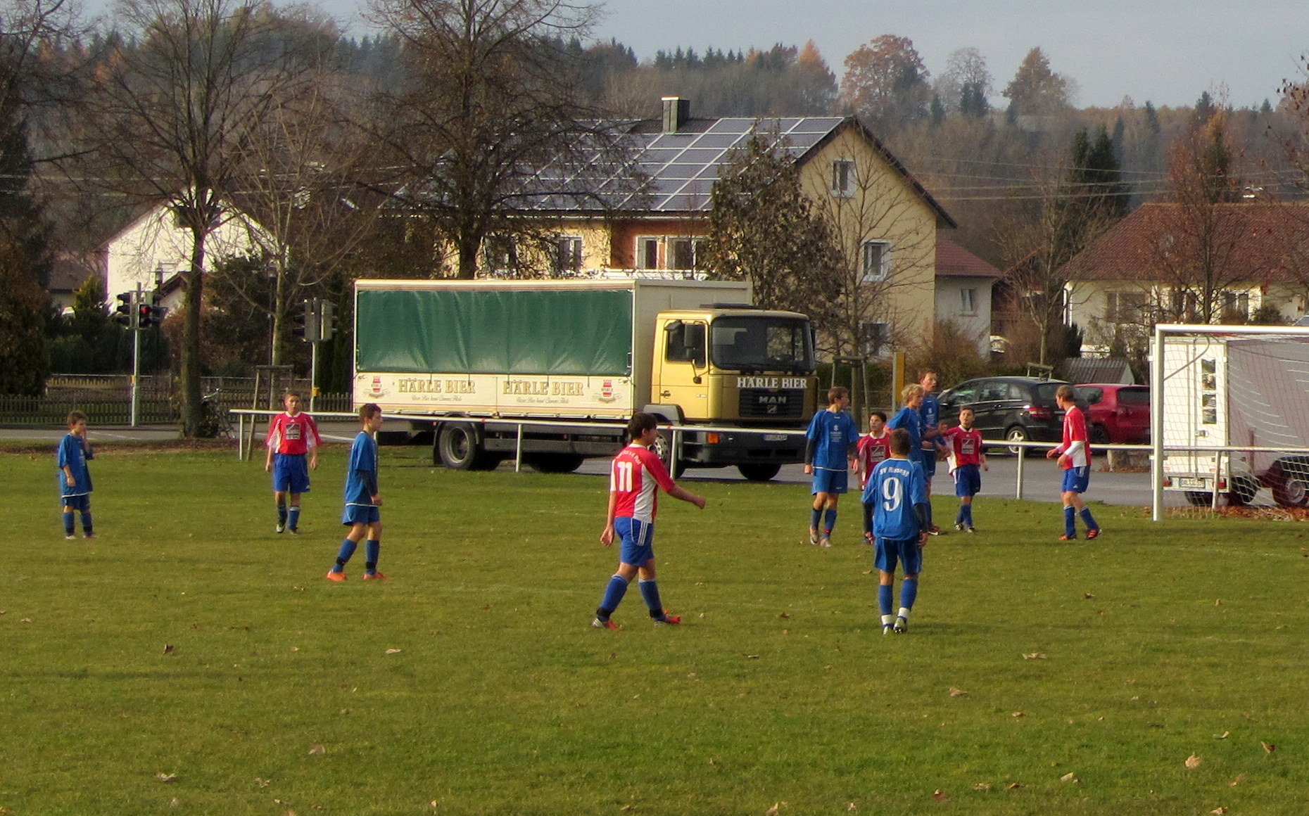 Clemens Härle Bierlaster am Sortplatz des TSV Rot an der Rot